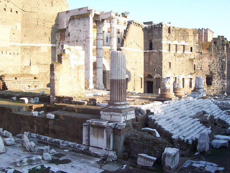 Roma - Tempio di Marte nel Foro di Augusto